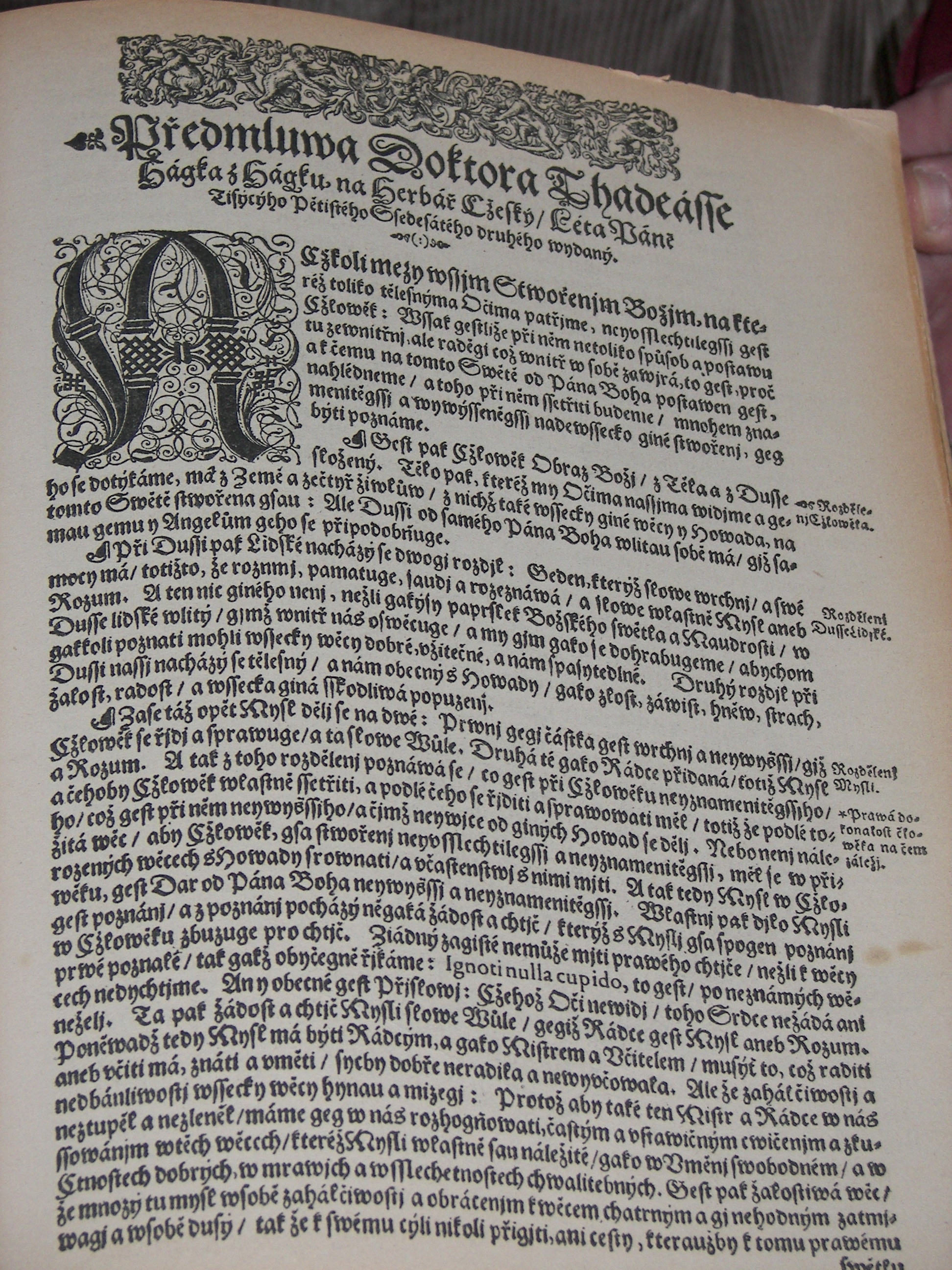 Předmluva Tadeáše Hájka z Hájku k jeho překladu českého herbáře